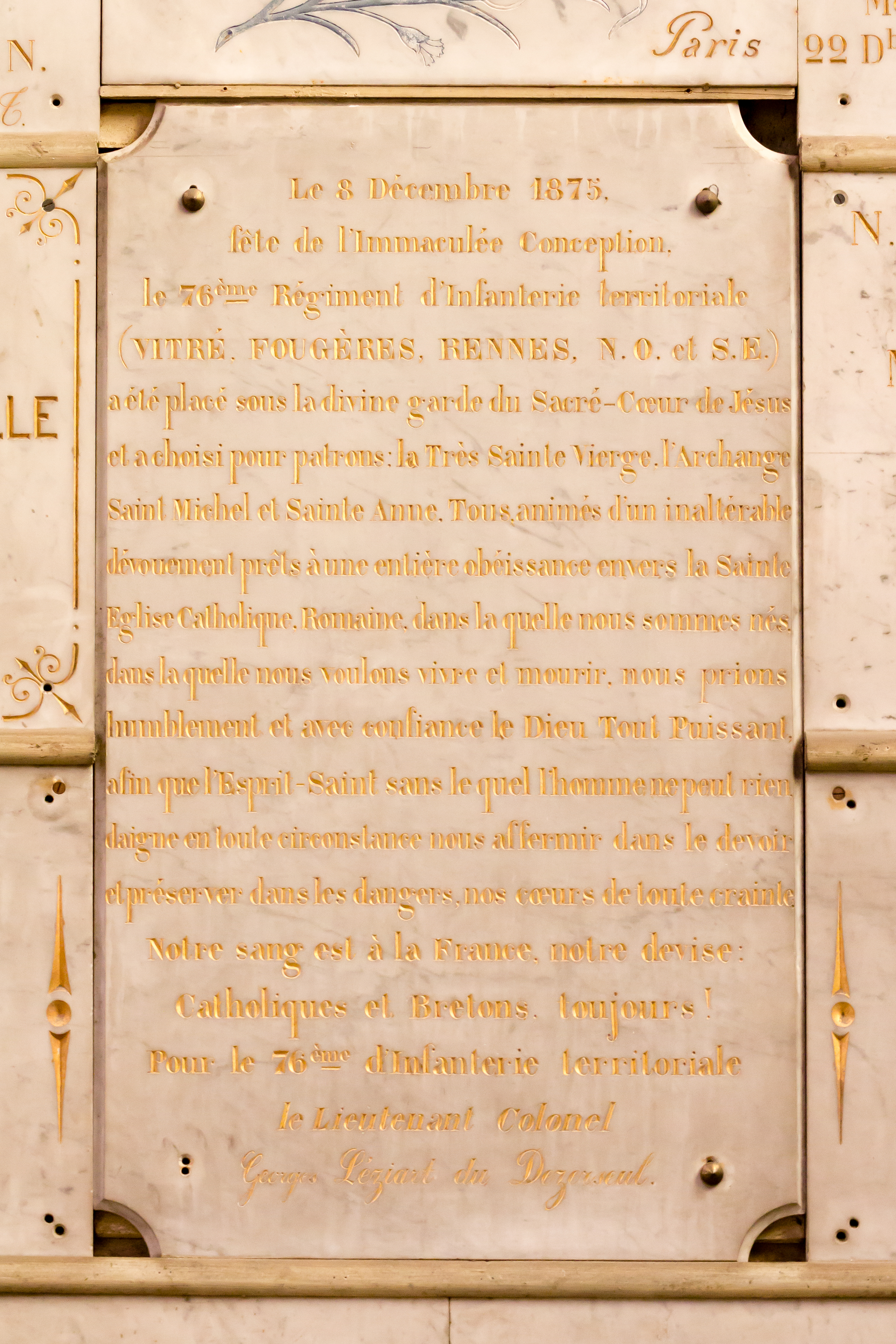 Ex-voto offert par le lieutenant-colonel Georges Léziart du Dézerseul, au nom du 76ème régiment d'infanterie territoriale, à l'occasion de la fête de l'Immaculée Conception. L'ex-voto se trouve à l'extrémité sud du collatéral ouest de l'église Saint-Aubin en Notre-Dame-de-Bonne-Nouvelle (Rennes, France)